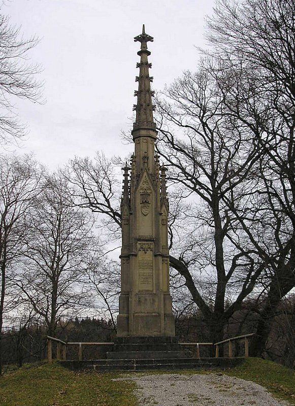 Burg Oberwittelsbach (Wittelsbach) bei Aichach (Landkreis Aichach-Friedberg, Bayerisch-Schwaben). Denkmal auf dem Burgplatz. Eigene Aufnahme, Feb. 2007 / Oberwittelsbach (Wittelsbach) castle near Aichach (Bavaria, Germany). Memorial on the plateau. Own photo, Feb. 2007